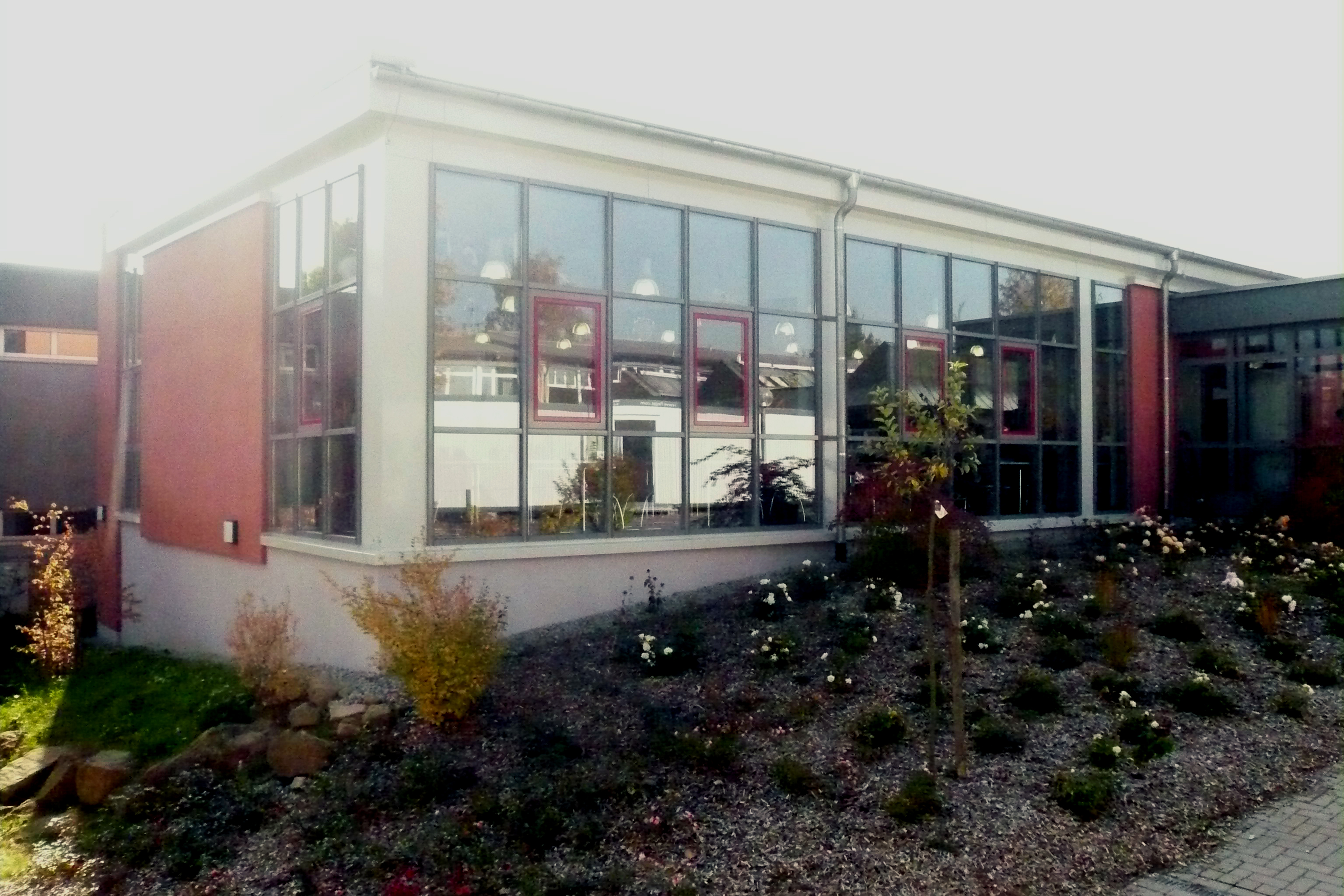 Mensa